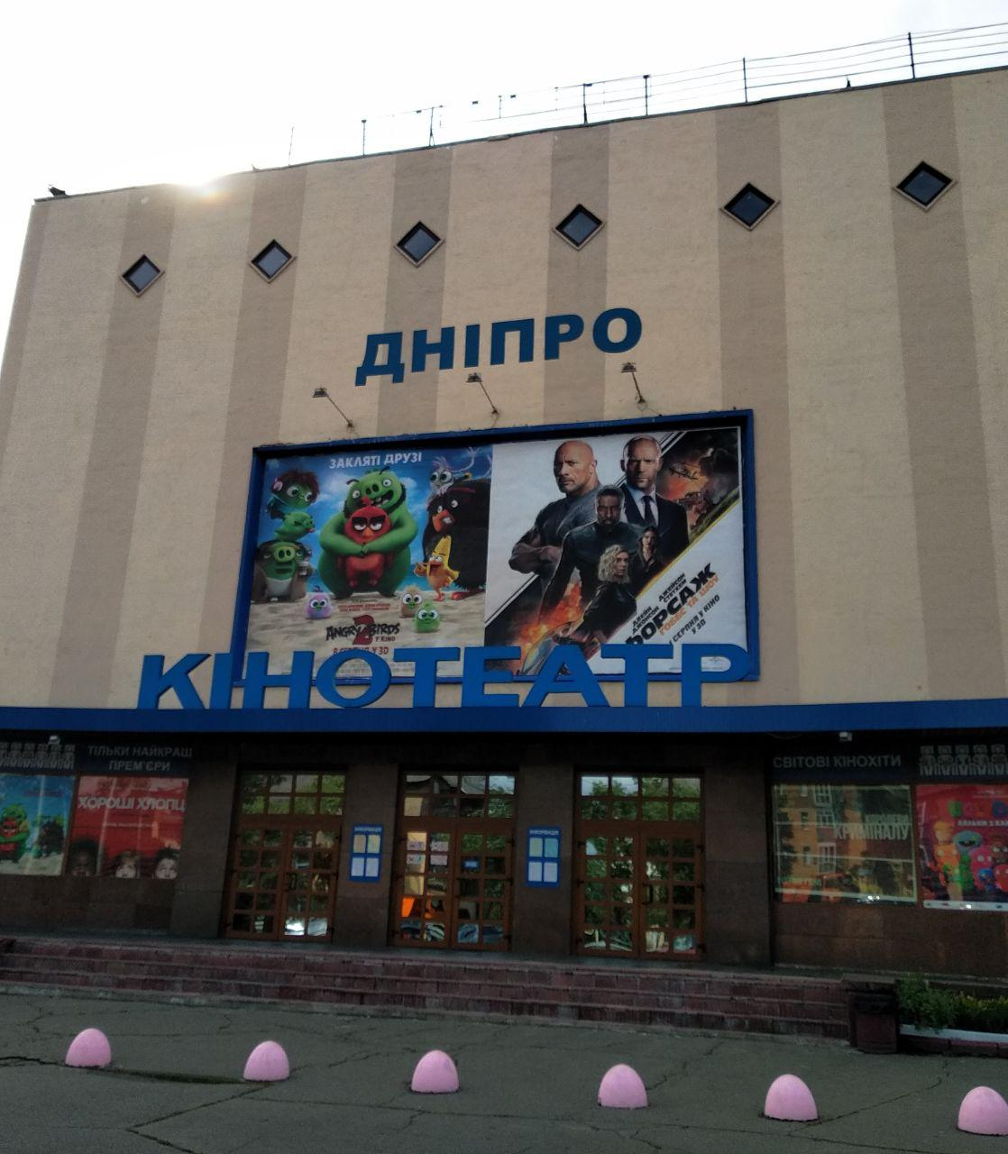 Київський кінотеатр